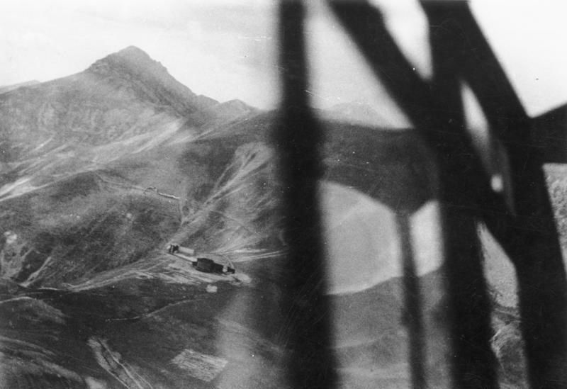 Scherl: PK XI. Fliegerkorps, Film-Nr.1502/11 Bildberichter: v. Kayser, Text: Dahm Datum 12.9.43, Bildbericht 353/43 mit 10 Aufnahmen. Bild 3 Das Geheimnis um die Duce-Befreiung gelöst Fallschirmjäger landeten mit Lastenseglern in der Bergwildnis des Gran Sasso. ... ist das Gefängnis des Duce, ein Berghaus knapp unter dem Gipfel des Gran Sasso erreicht. Die Männer in den Seglern packen Waffen und Gerät fester. Der Flugzeugführer stösst hinab zu einer kühnen Landung auf gefährlichstem Gebirgsgelände. Zentralbild, II. Weltkrieg 1939-4 Zur Mussolini-Befreiung am 12.9.1943 durch den SS-Sturmbannführer Otto Skorzeny aus dem Berghotel auf dem Gran Sasso in den Abruzzen. Nach seinem Sturz am 25.6.1943 wurde Mussolini durch Badoglio-Truppen auf dem Gran Sasso gefangengehalten. Skorzeny befreite ihn im Handstreich mit deutschen Fallschirmjägern, SS-Männern und Sicherheitsdienst. UBz: einen Blick aus dem Lastensegler, mit dem die Fallschirmjäger anfliegen, auf das Berghaus knapp unter dem Gipfel des Gran Sasso.